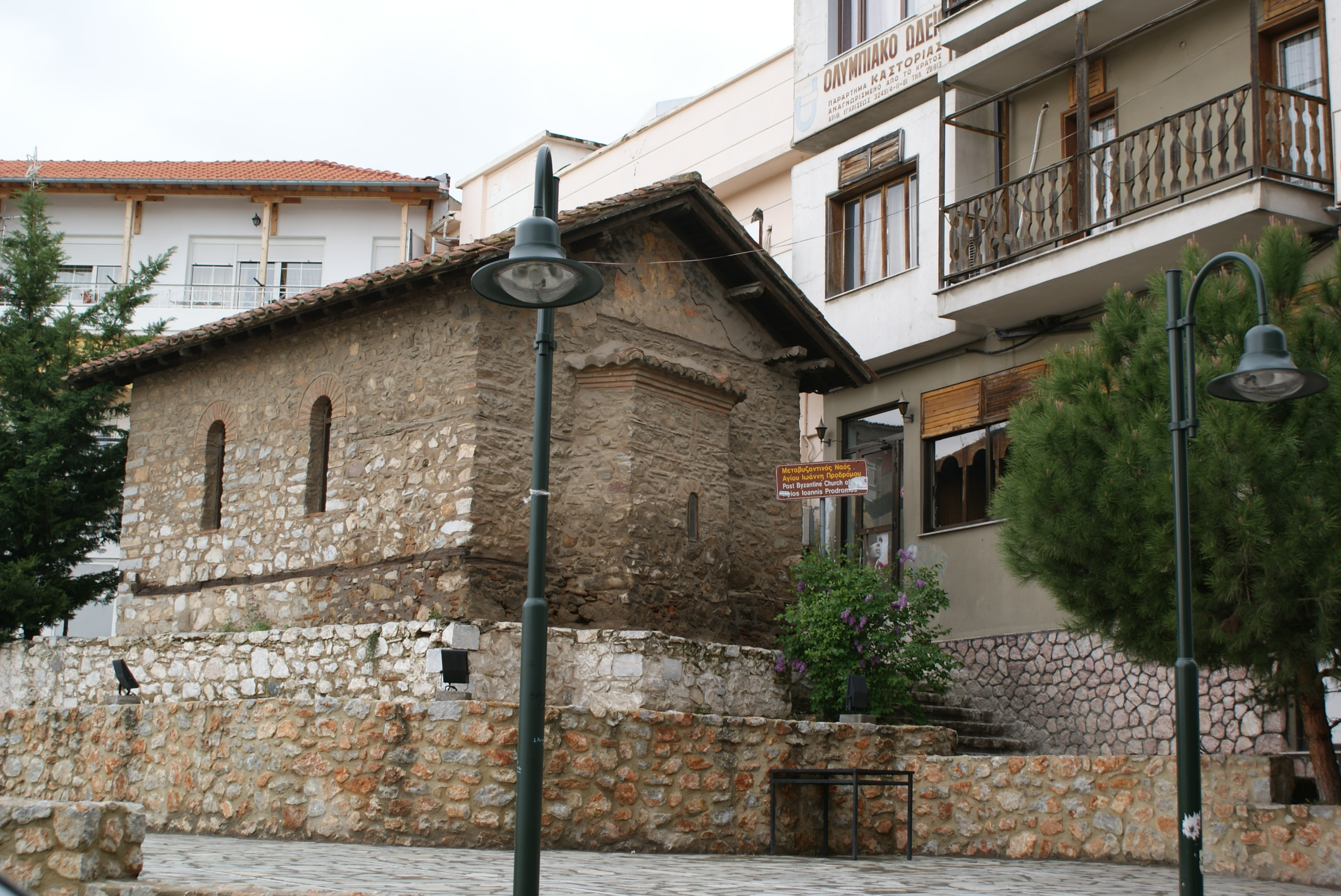 Църквата Свети Йоан Продром, Костур, Гърция.